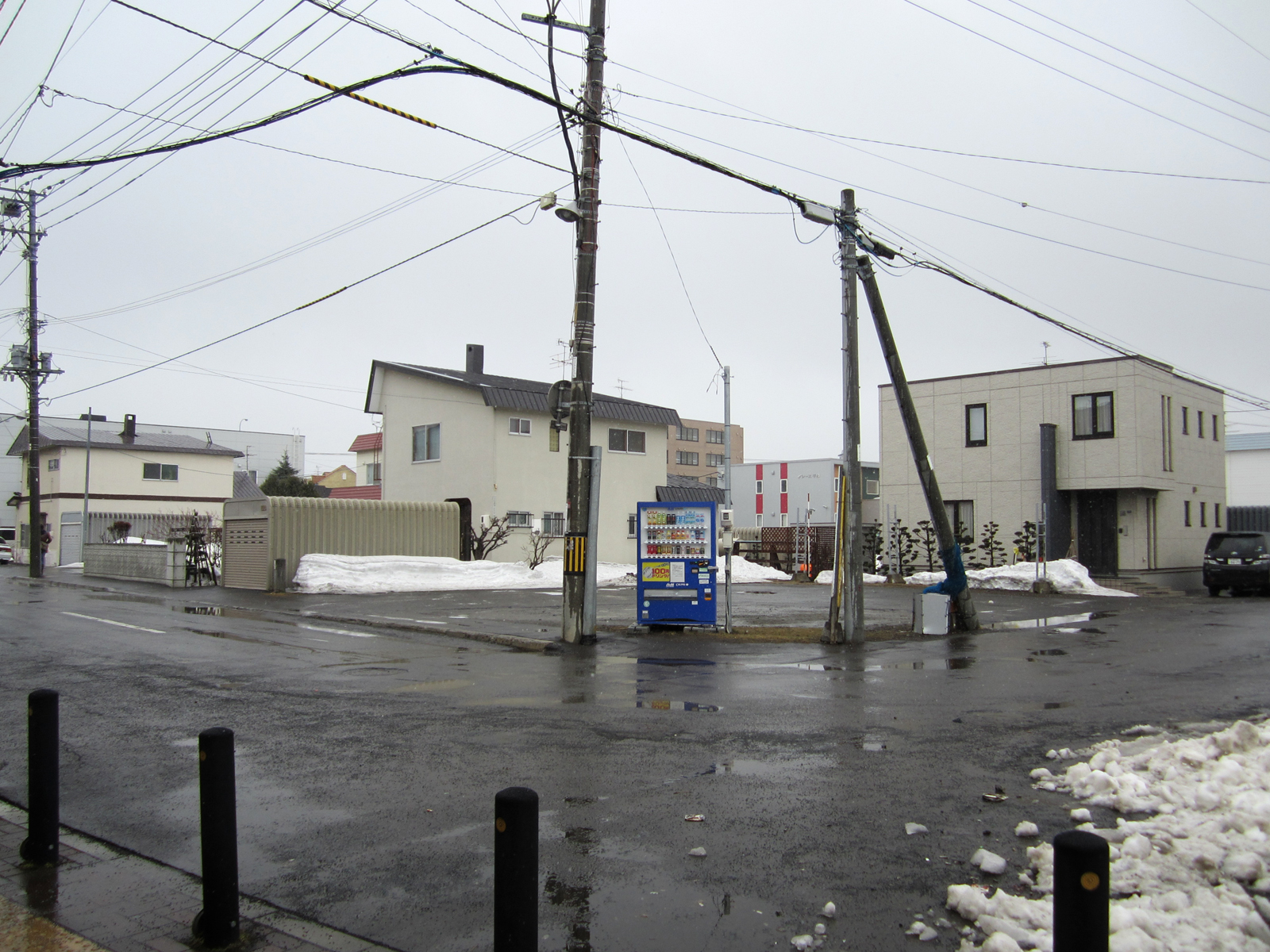 北海道中央バス北柏山転換所（白34）